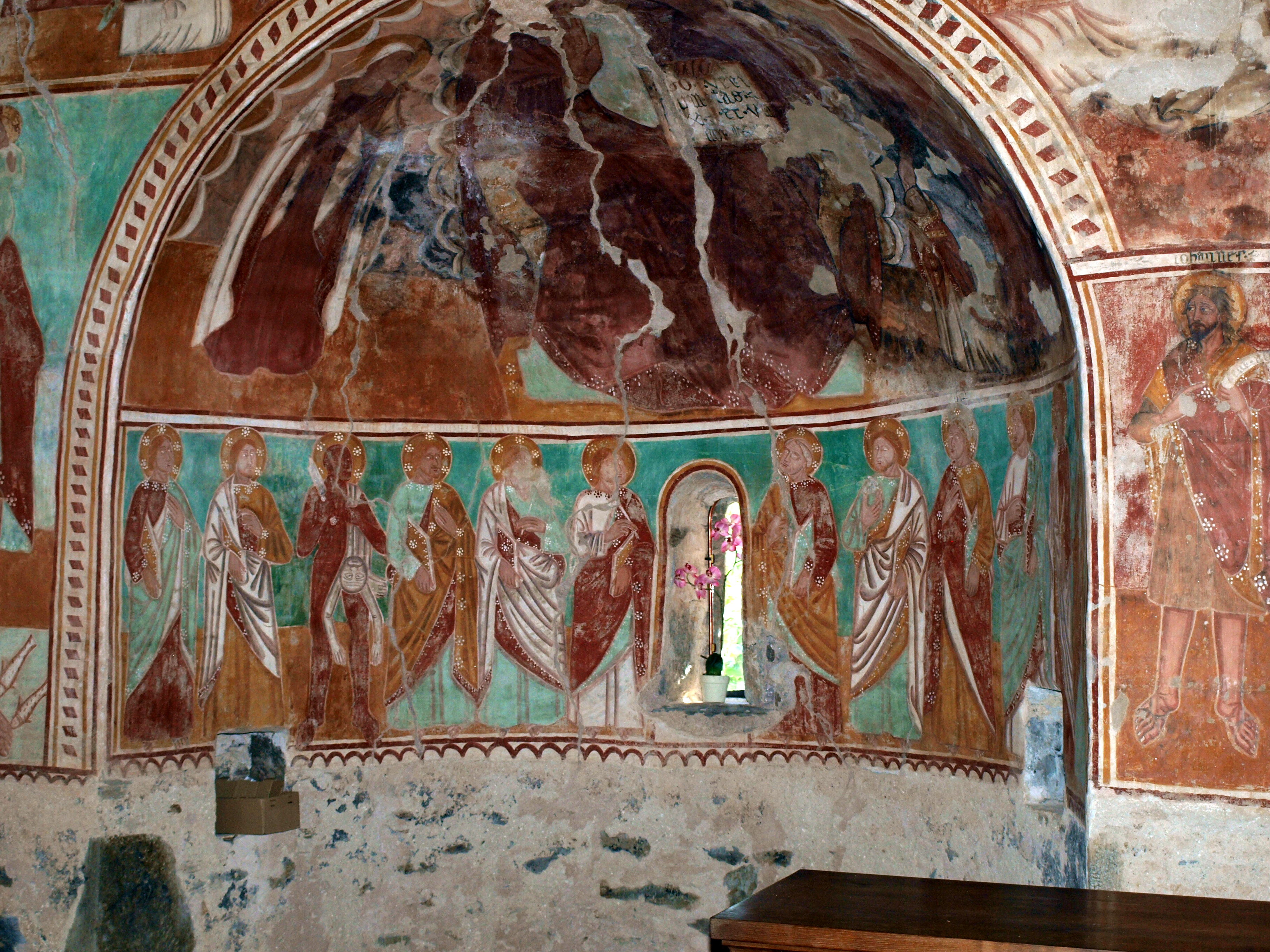 Fresken mit Heiligen in der Kapelle Santa Cristina